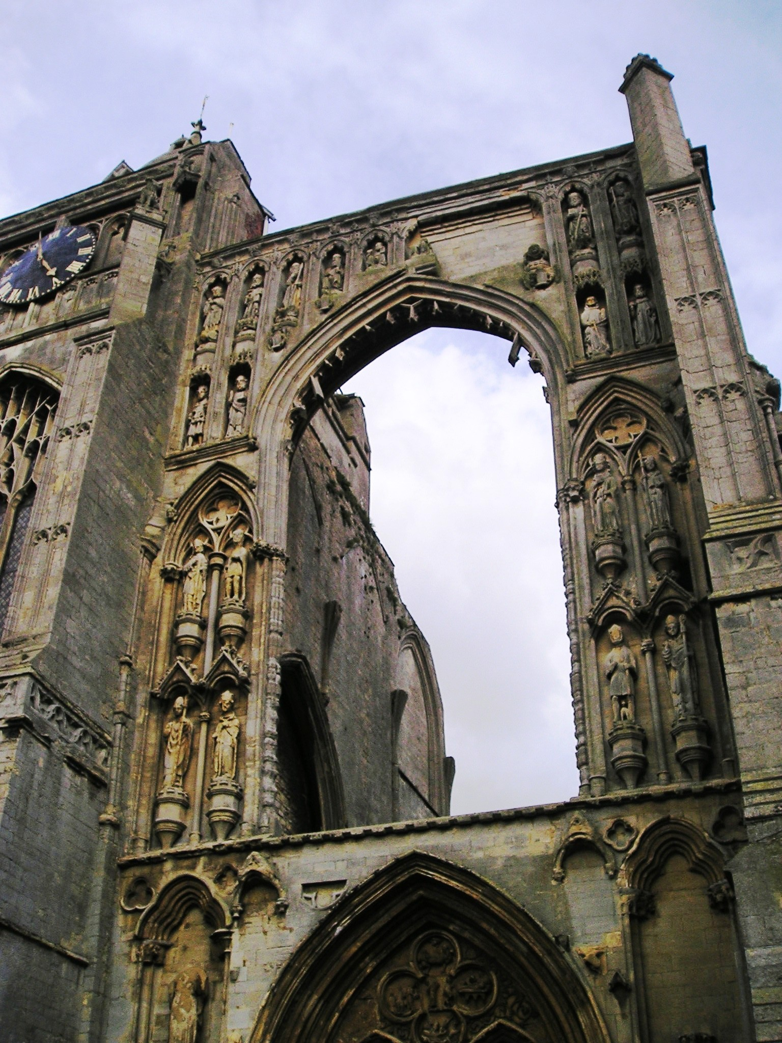 Crowland,_Croyland_Abbey,_Westfassade